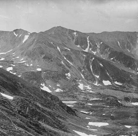 Vista de la vall de Cadí amb neu des del coll Barbet. Frederic Bordas i Altarriba (ca. 1882)